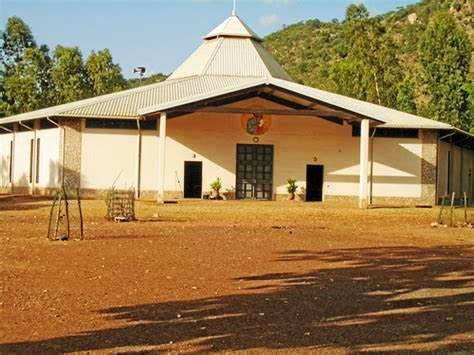 au pied de la montagne de Tanguiéta (chaine de l'atacora)